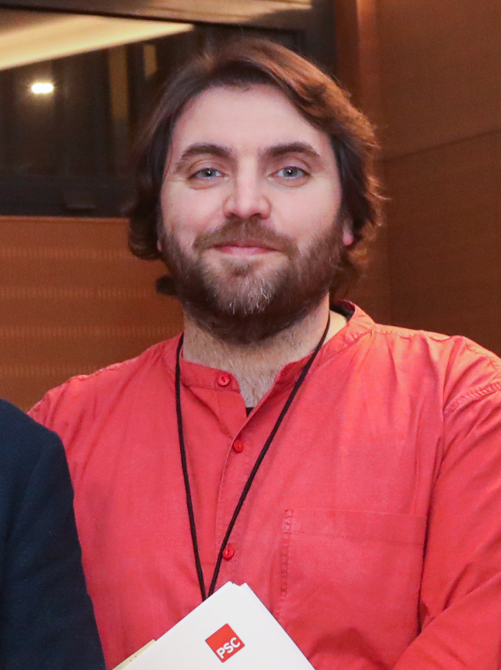 7M0A6538